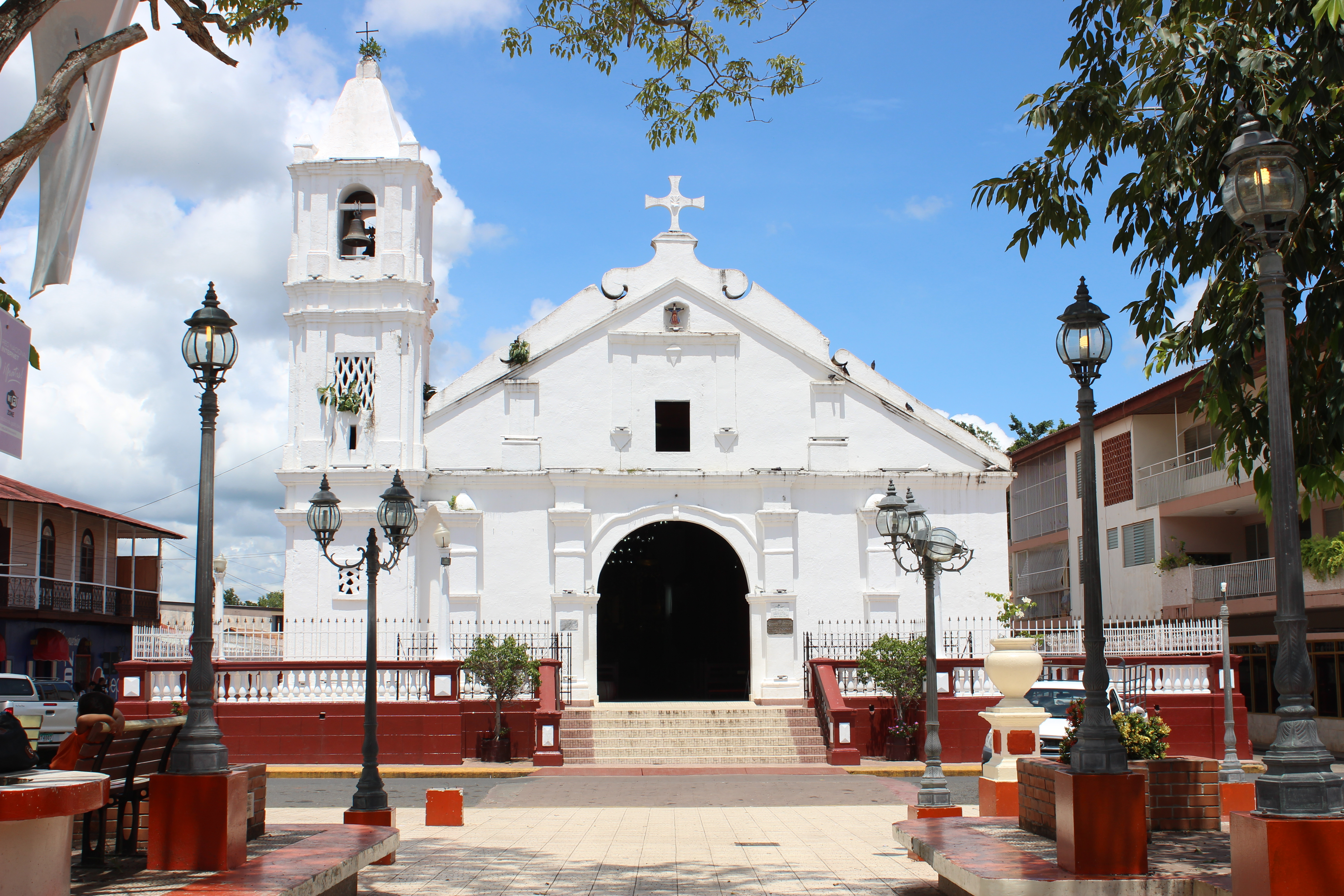 este lugar es punto de reunión de muchos feligreses que con fe y esperanza van en pos de pagar los milagros...